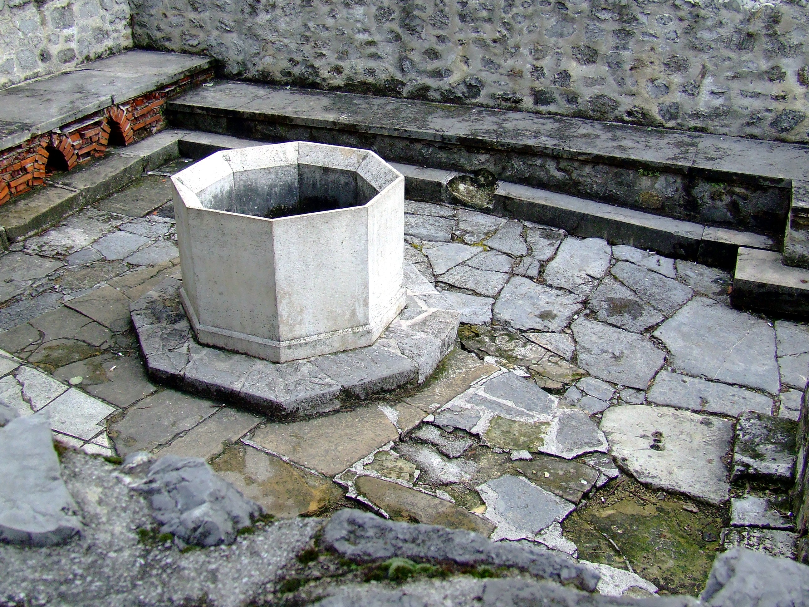 Memi pasa fürdőjének romjai Pécsen